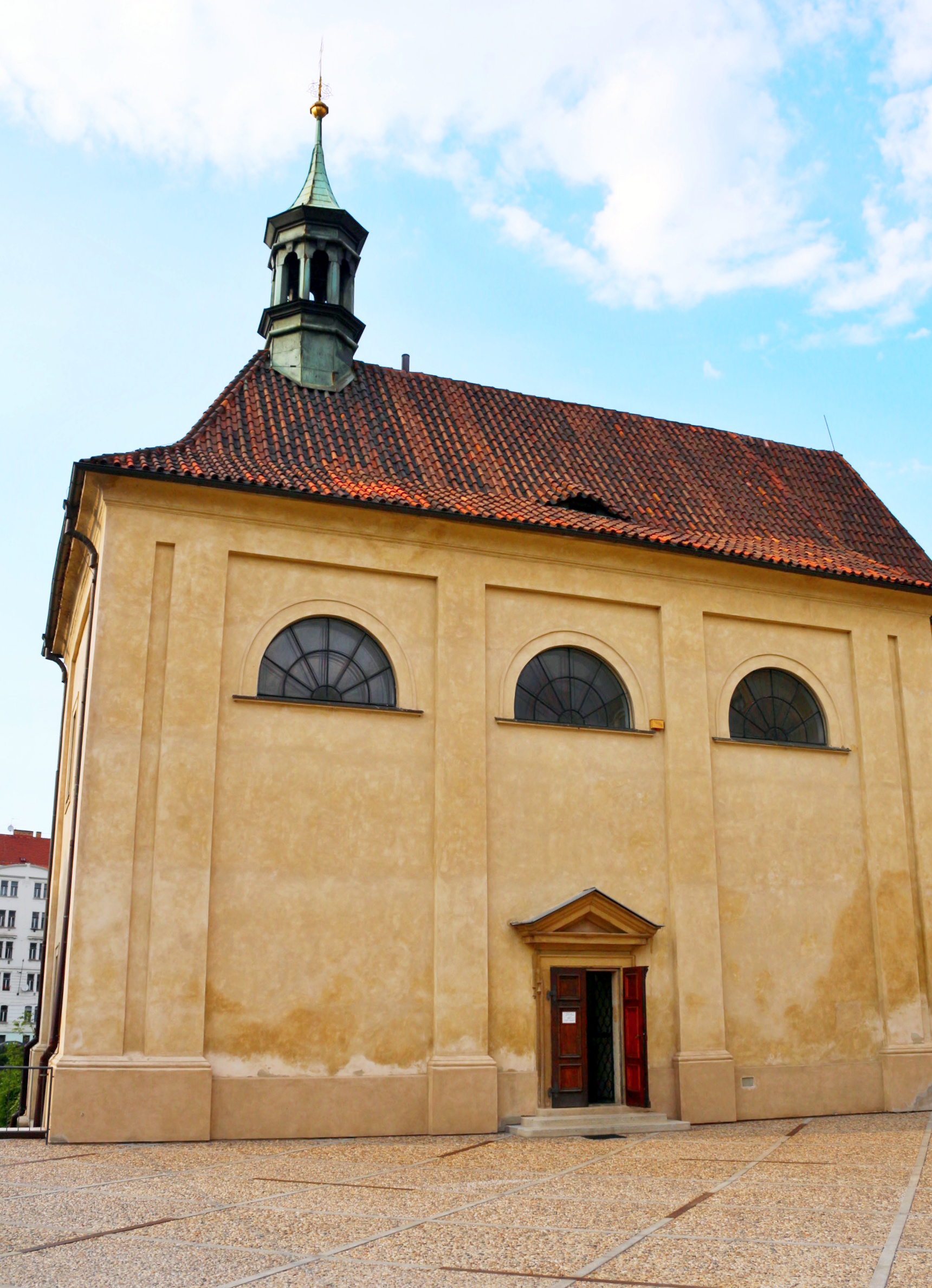 Chrám svatých Kosmy a Damiána v Emauzském klášteře, Praha